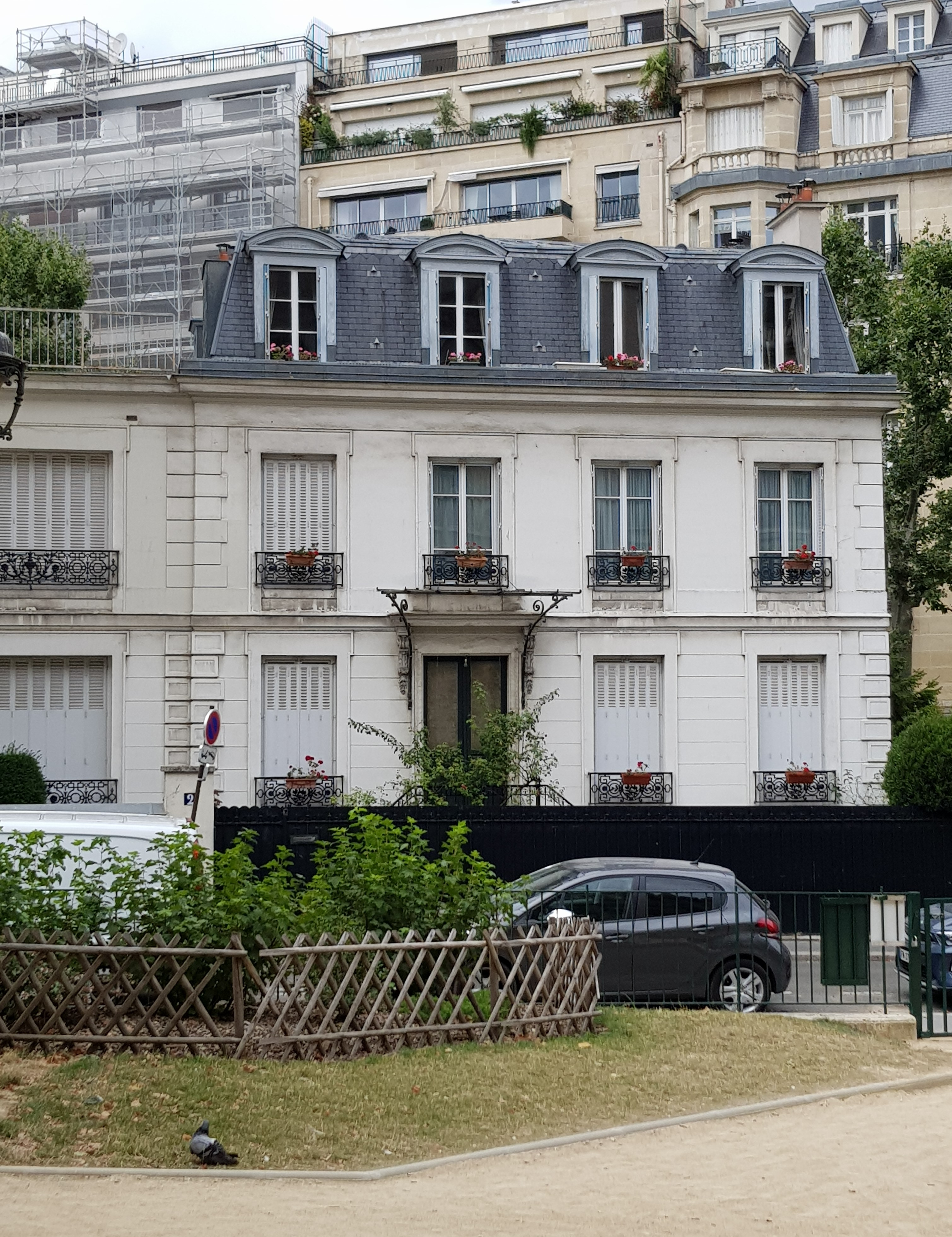 2, square Lamartine, Paris 16e.